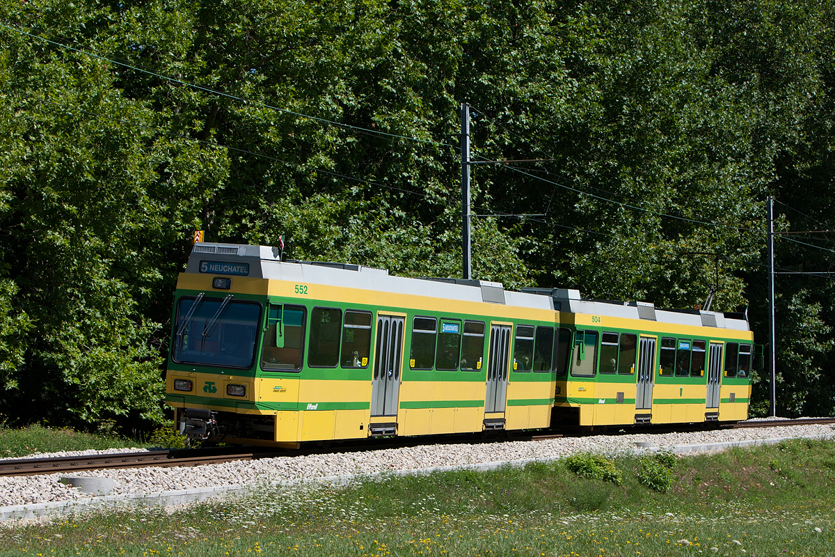 Tram 5 (Neuchâtel - Boudry) beim Bahnhof von Colombier